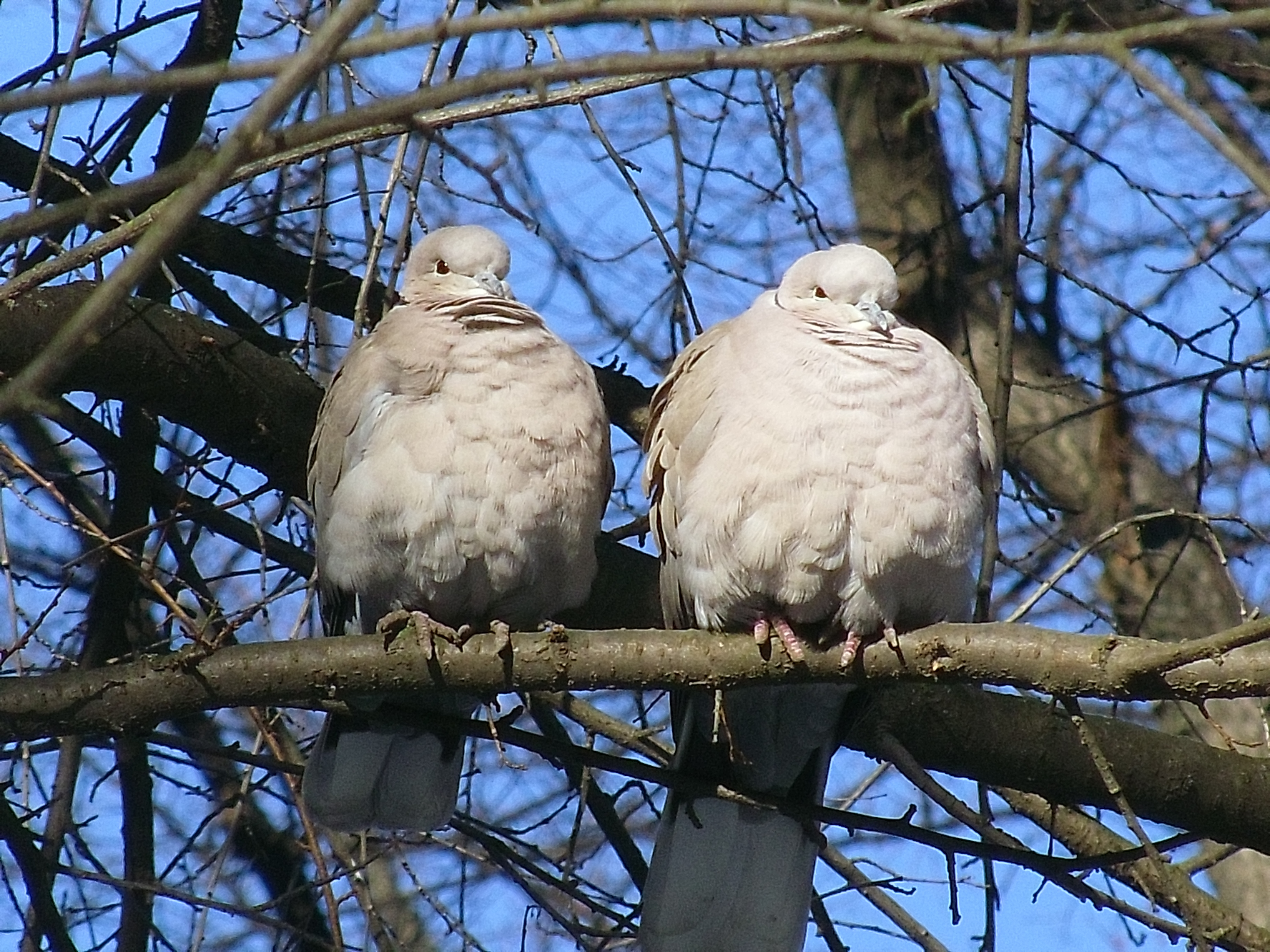 Горлиці садові (Streptopelia decaocto)